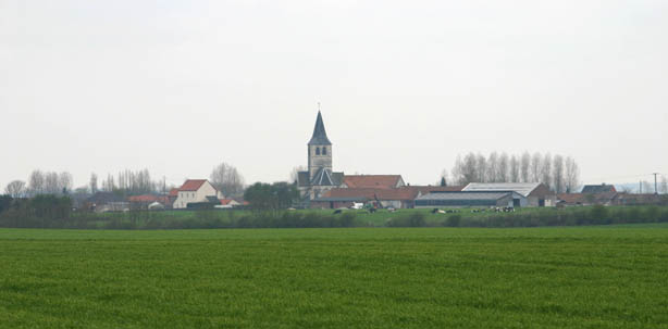 Vue générale du village, photo prise sur la route de Valhuon avec ferme ancienne premier plan